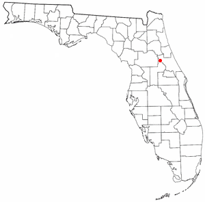 Die Karte zeigt die Lage von Astor in Florida